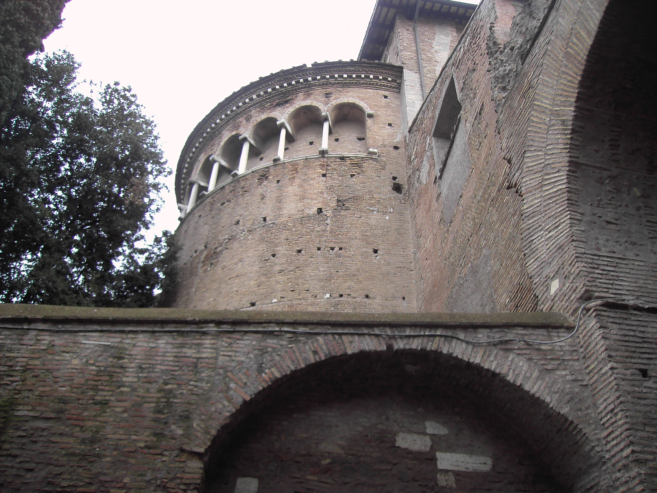 Roma, basilica dei santi Giovani e Paolo al Celio - abside dal clivo di Scauro.